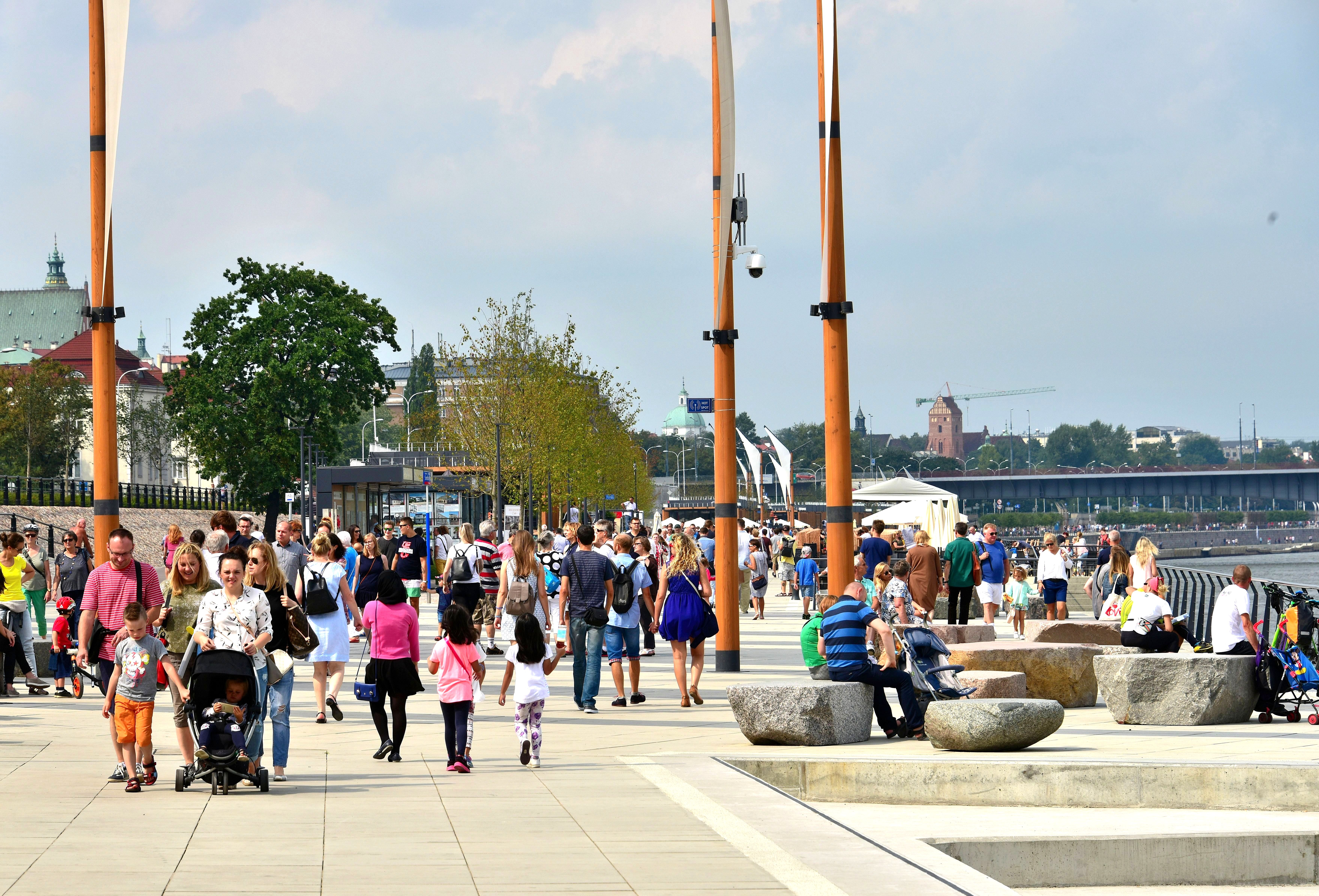 Bulwary wiślane w Warszawie - bulwar gen. George'a Smitha Pattona